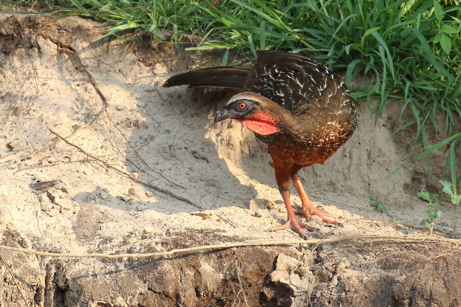 Pénélope à ventre roux, Pantanal (Brésil)